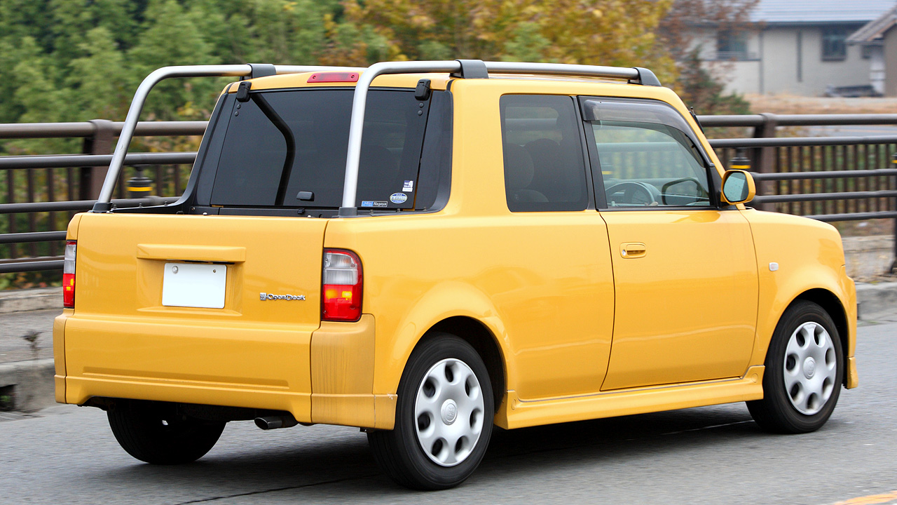 Toyota bB Open Deck ( NCP34 )